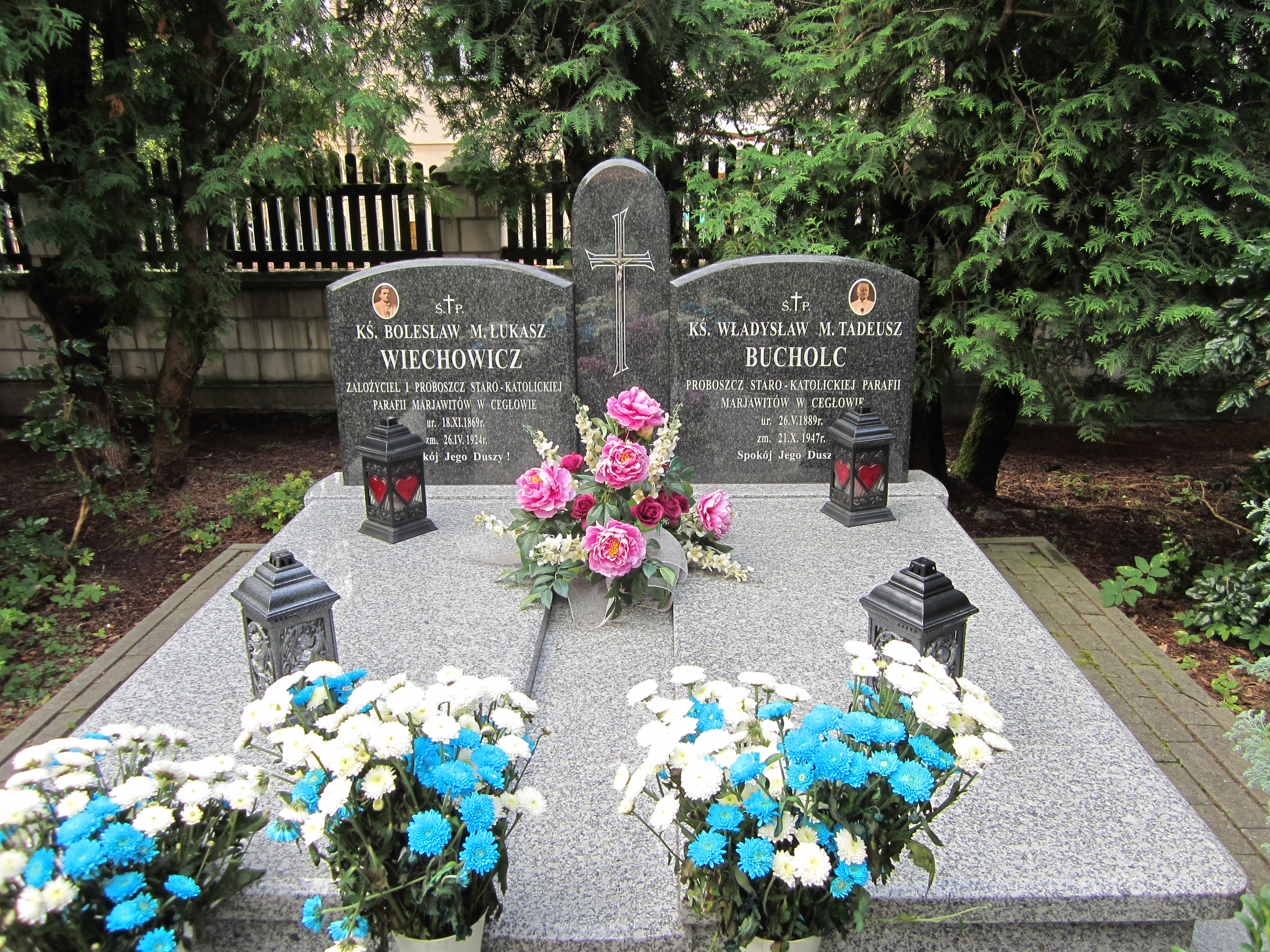 Nagrobek kapłana Bolesława Marii Łukasza Wiechowicza i kapłana Władysława Marii Tadeusza Bucholca na cmentarzu przykościelnym w Cegłowie.